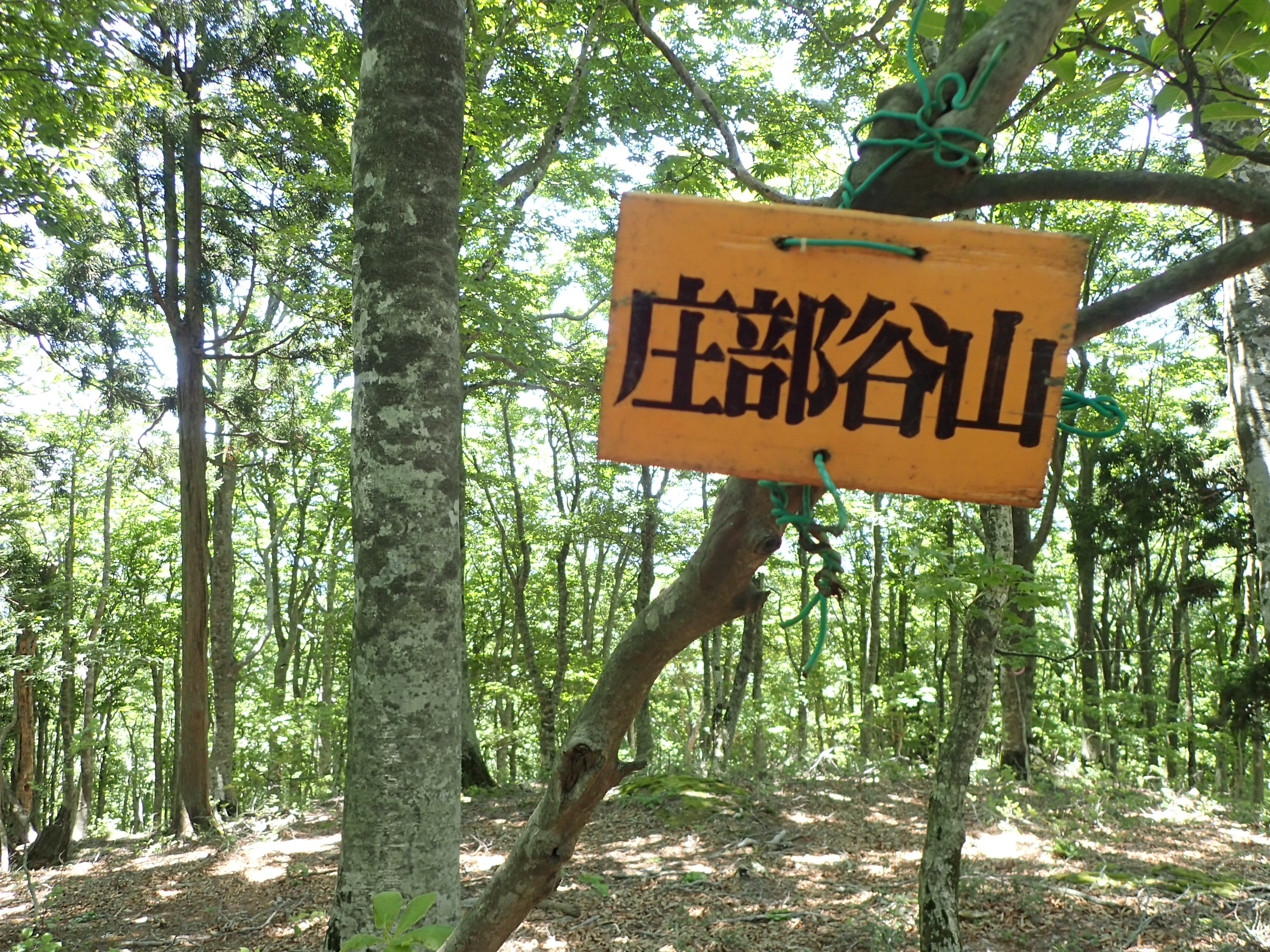 庄部谷山の山頂